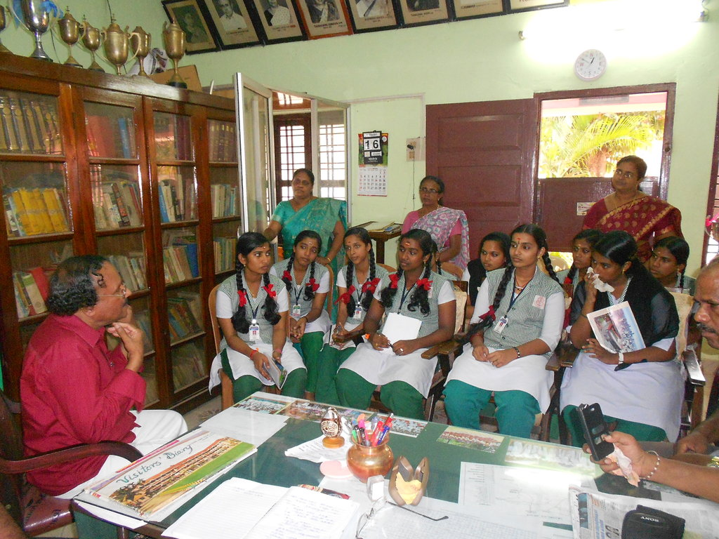 മണമ്പൂര്‍ രാജന്‍ബാബു